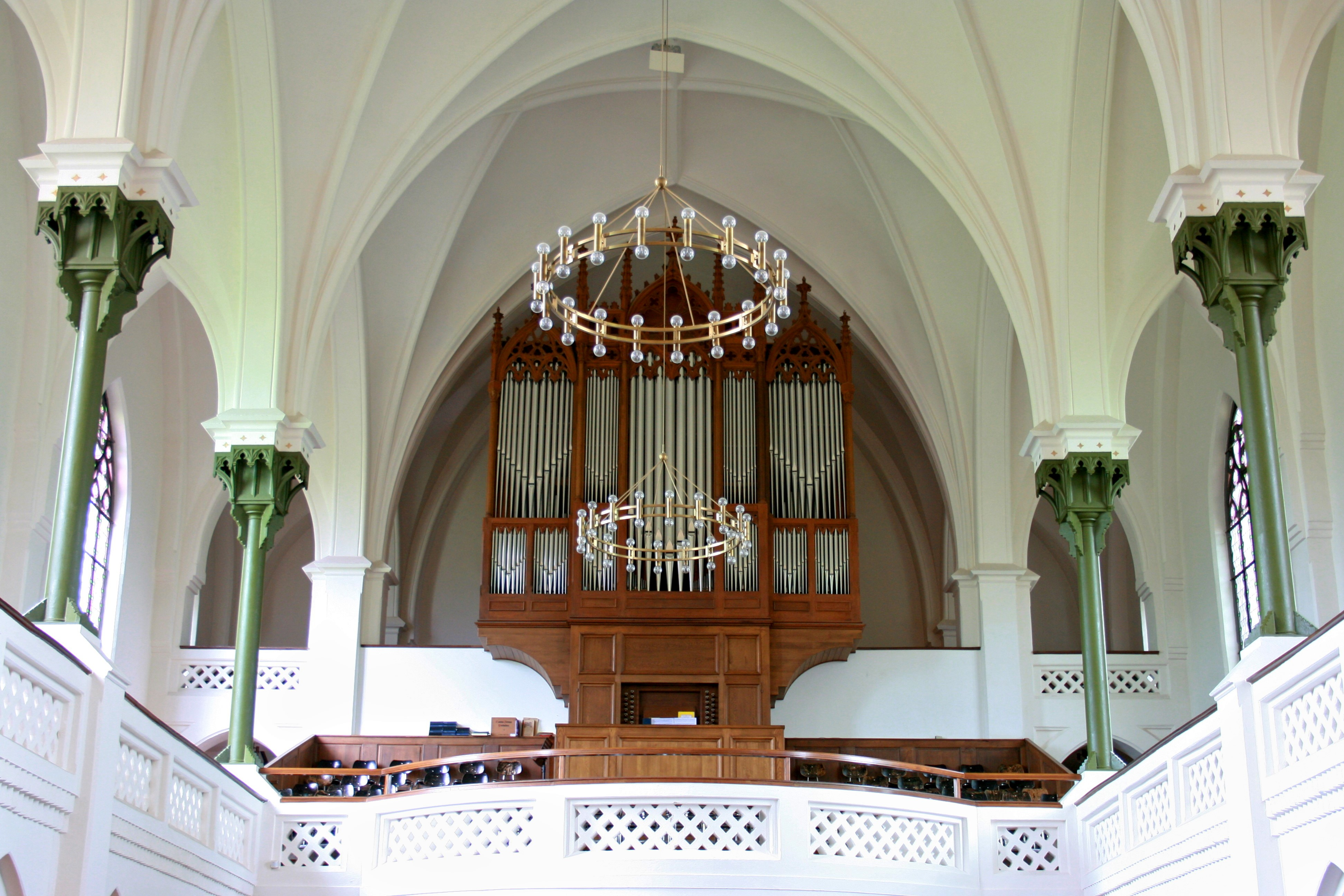 Evangelische Stadtkirche in Rotenburg (Wümme)